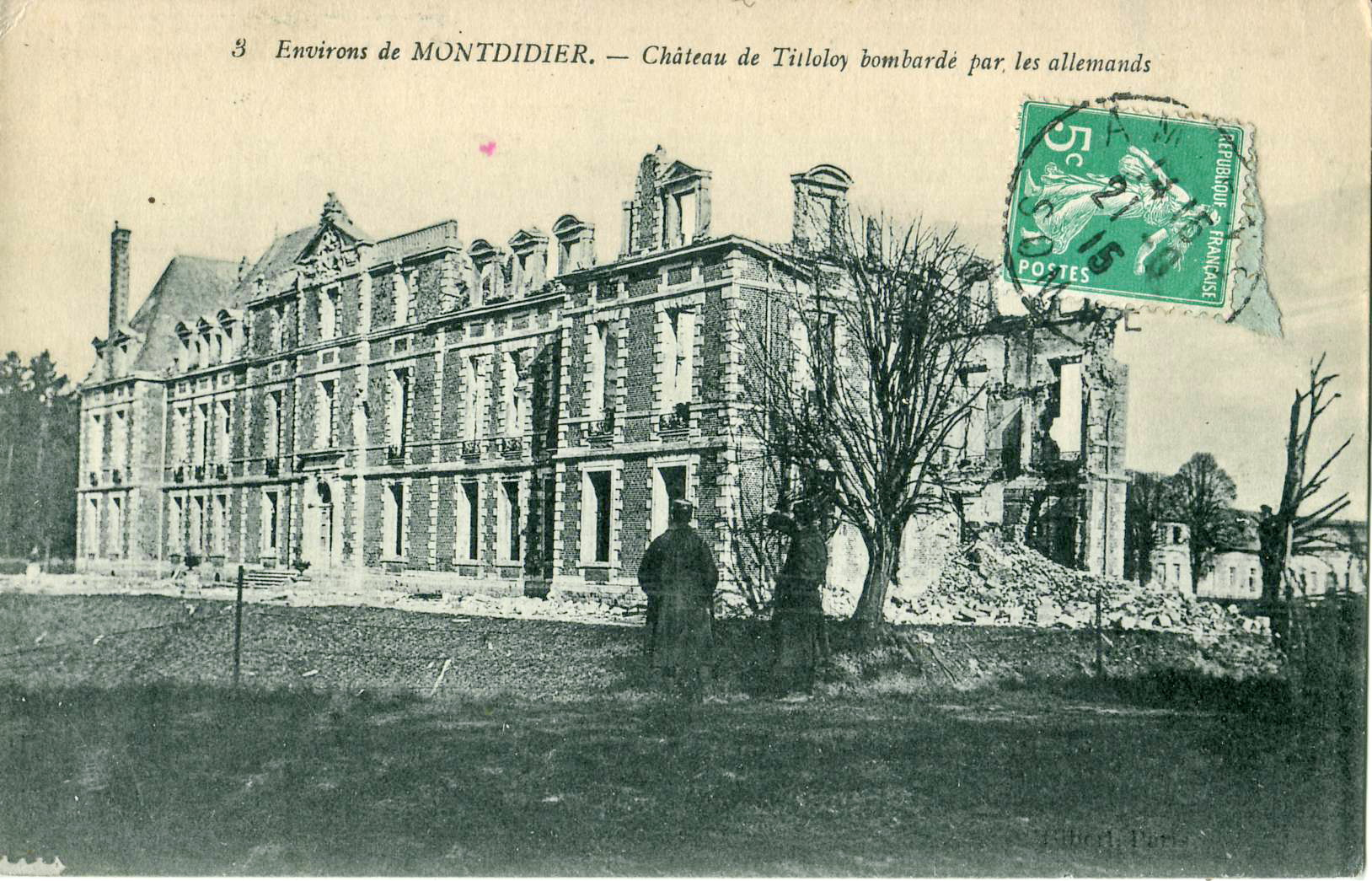 Carte postale ancienne éditée par Bibibert, n°3n imprimée par Bourdier à Versailles, collection Environs de Montdidier :Château de Tilloloy bombardé